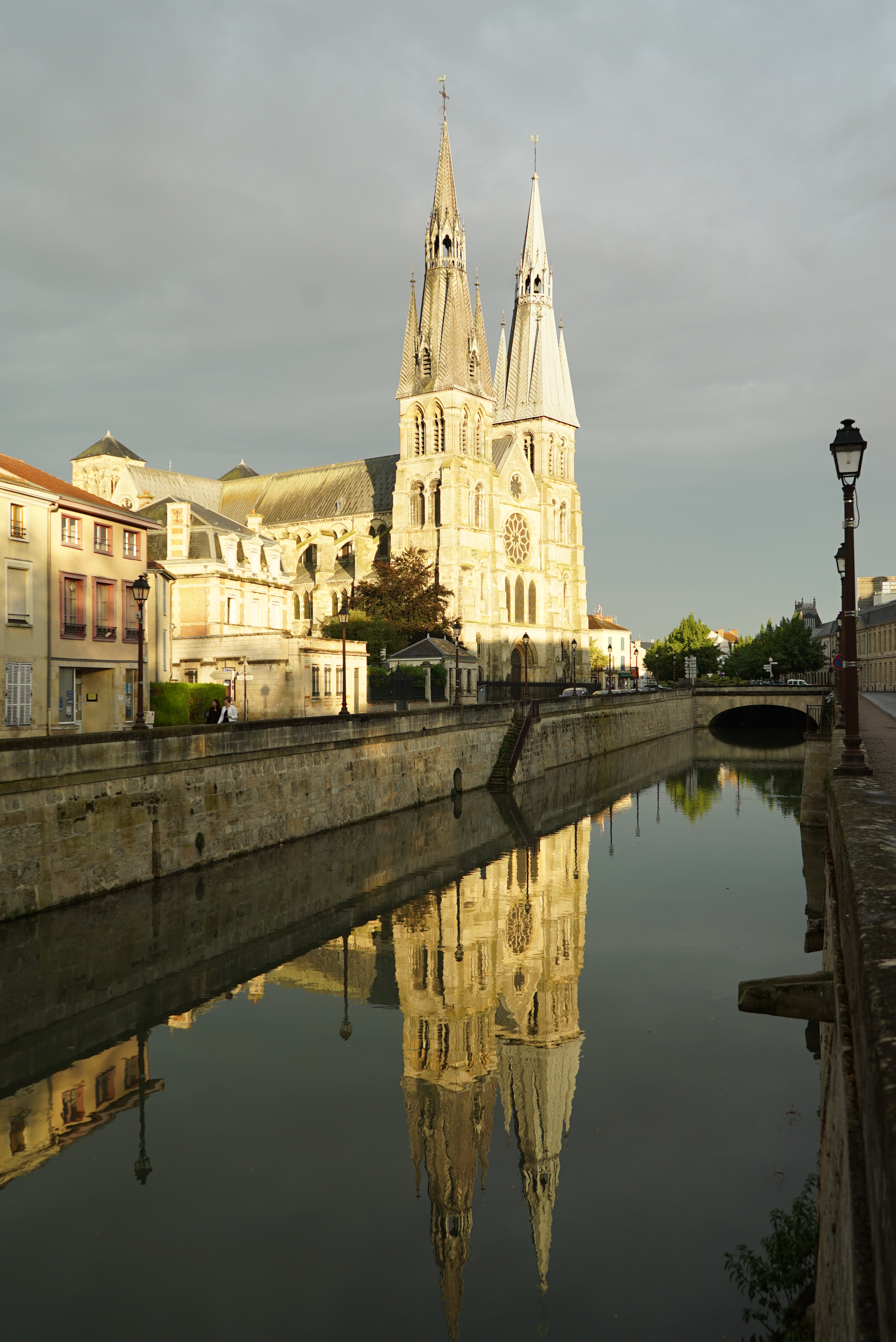 vue de Chalons.